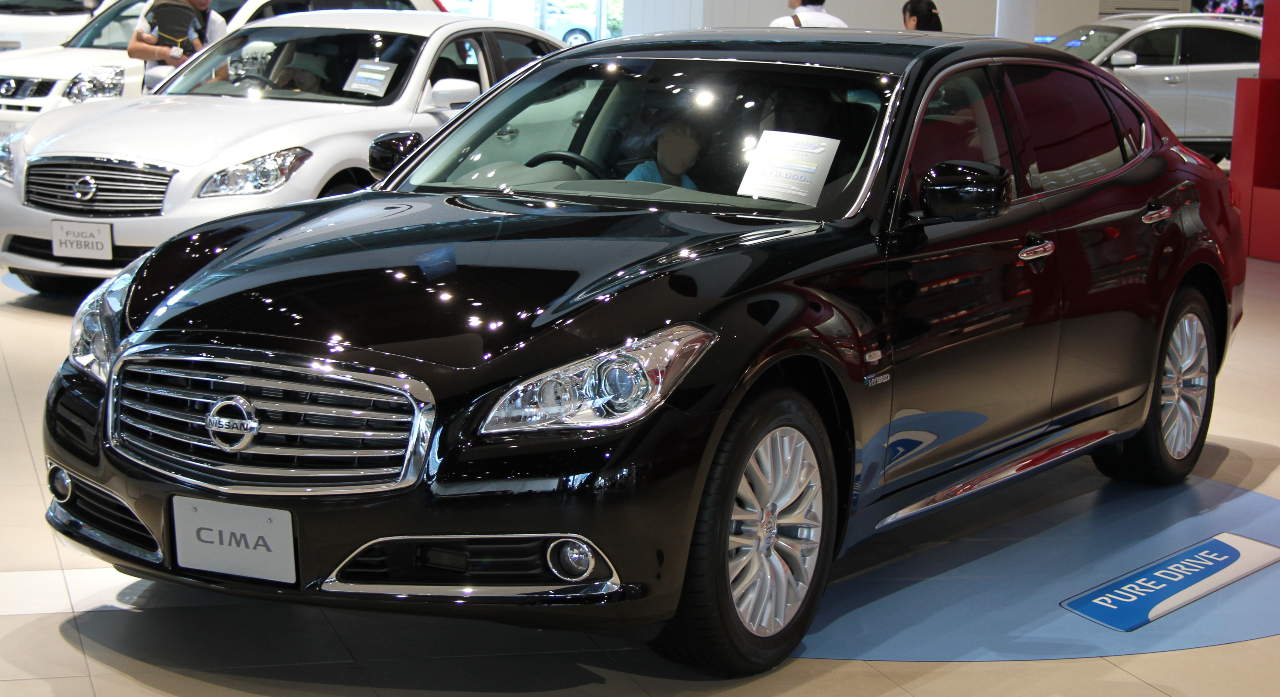 Nissan Cima